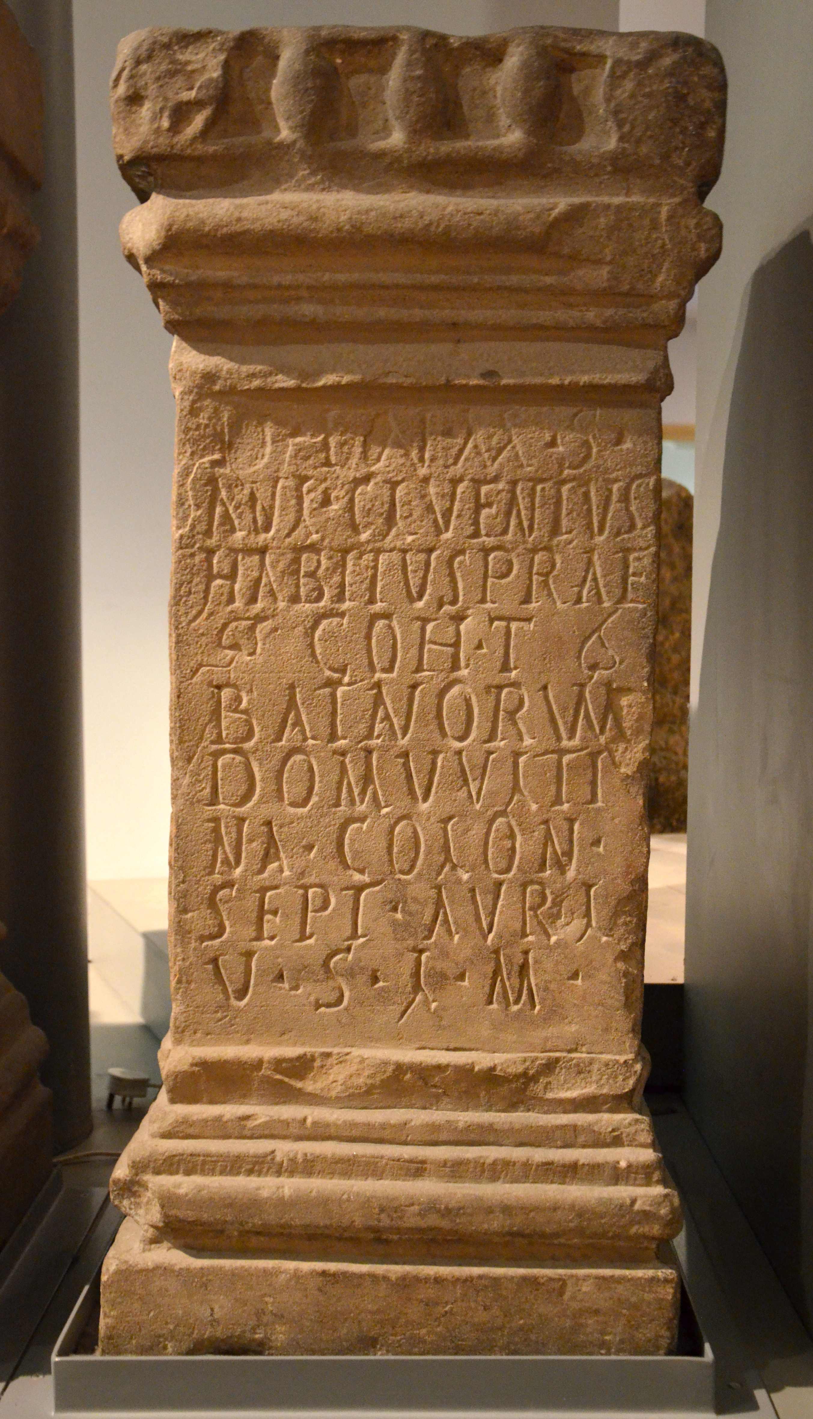 D(eo) In(victo) M(ithrae) s(acrum) Aul(us) Cluentius Habitus pra(e)f(ectus) coh(ortis) I Batavorum domu Ulti- n(i)a (tribu) Colon(ia) Sept(imia) Aur(elia) L(arino) v(otum) s(olvit) l(ibens) m(erito)